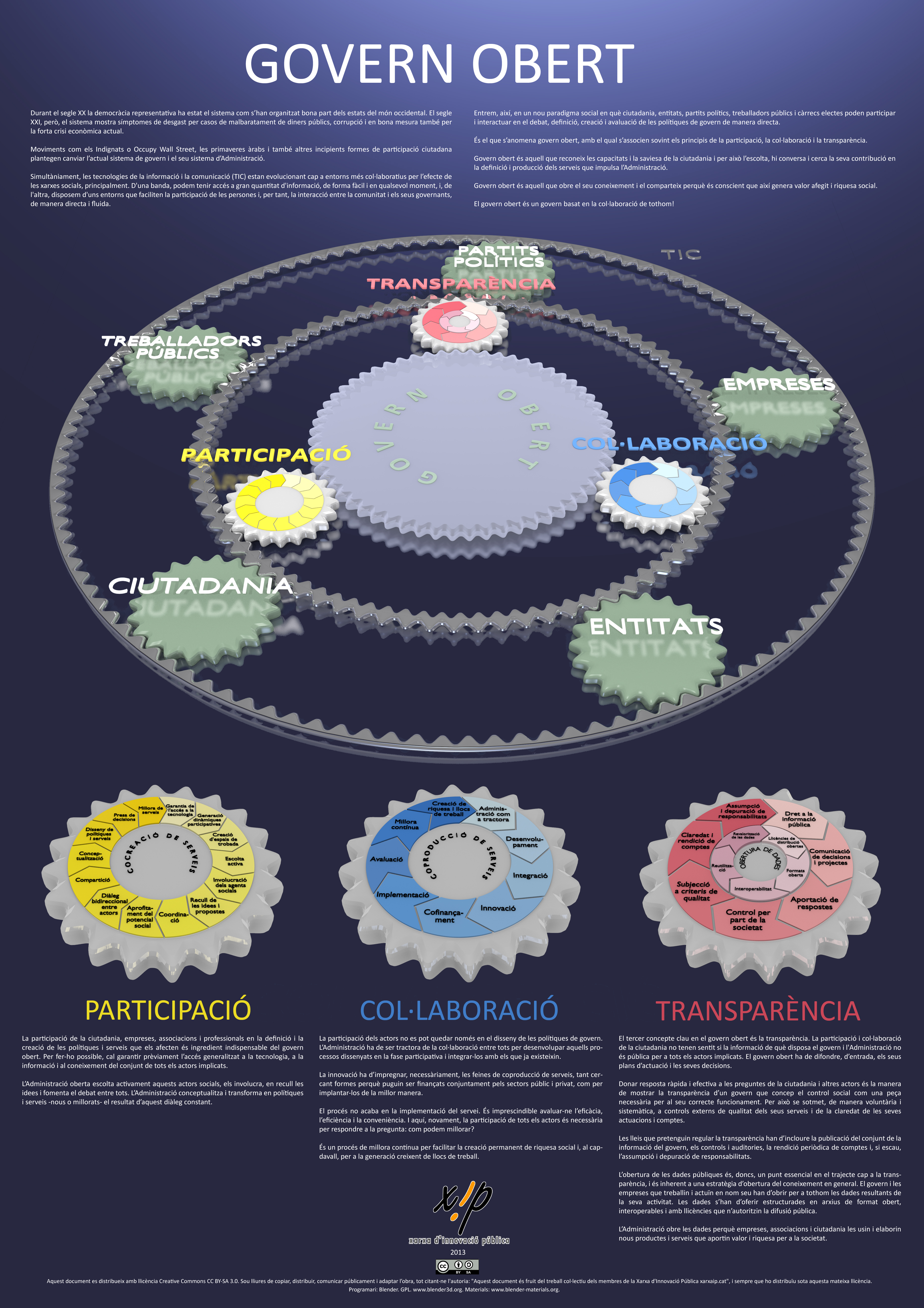 Infografia Govern Obert póster. Xarxa d'Innovació Pública